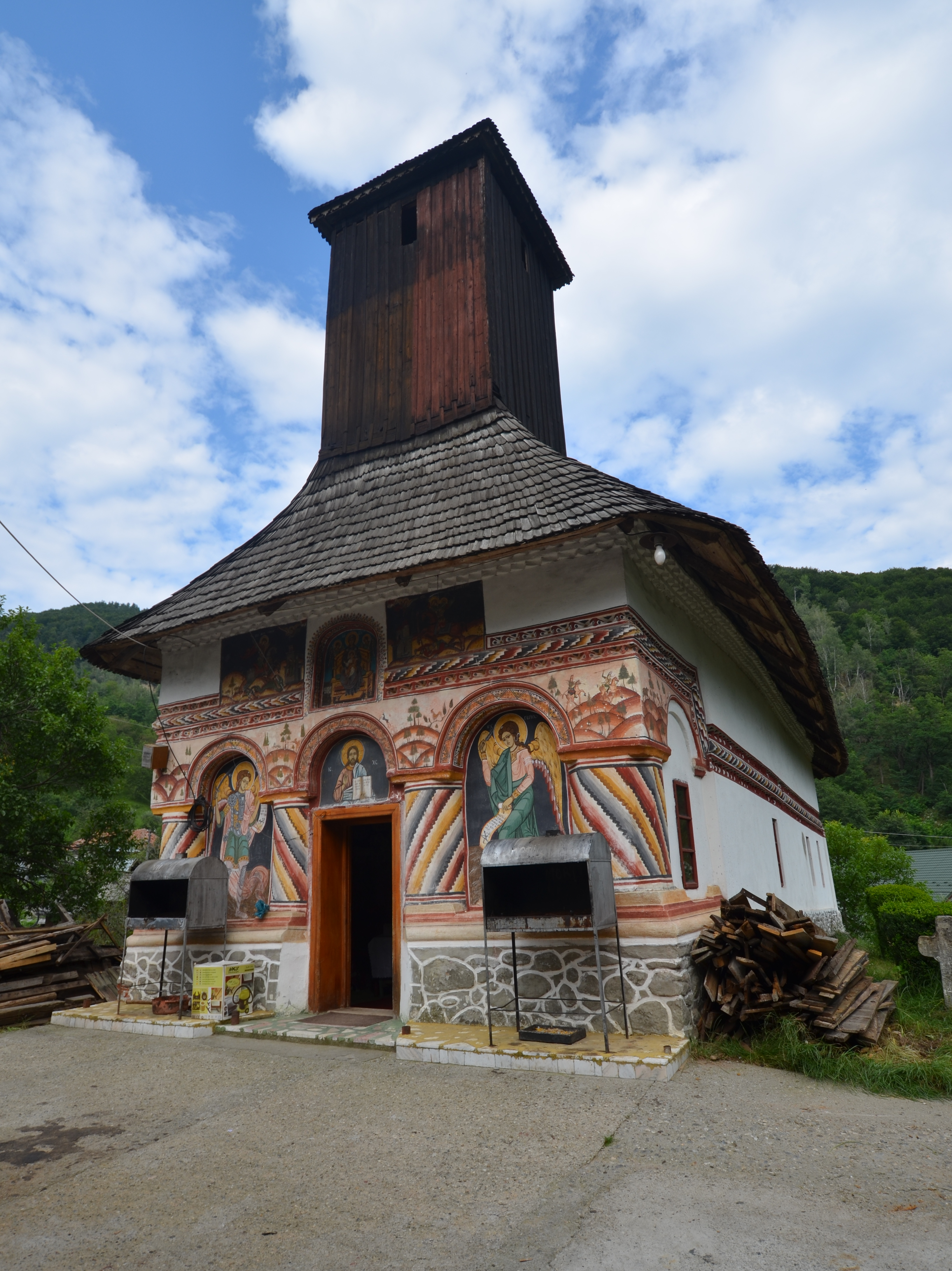 Biserica "Sf. Voievozi", localitate componentă Cheia; oraș Băile Olănești, județul Vâlcea